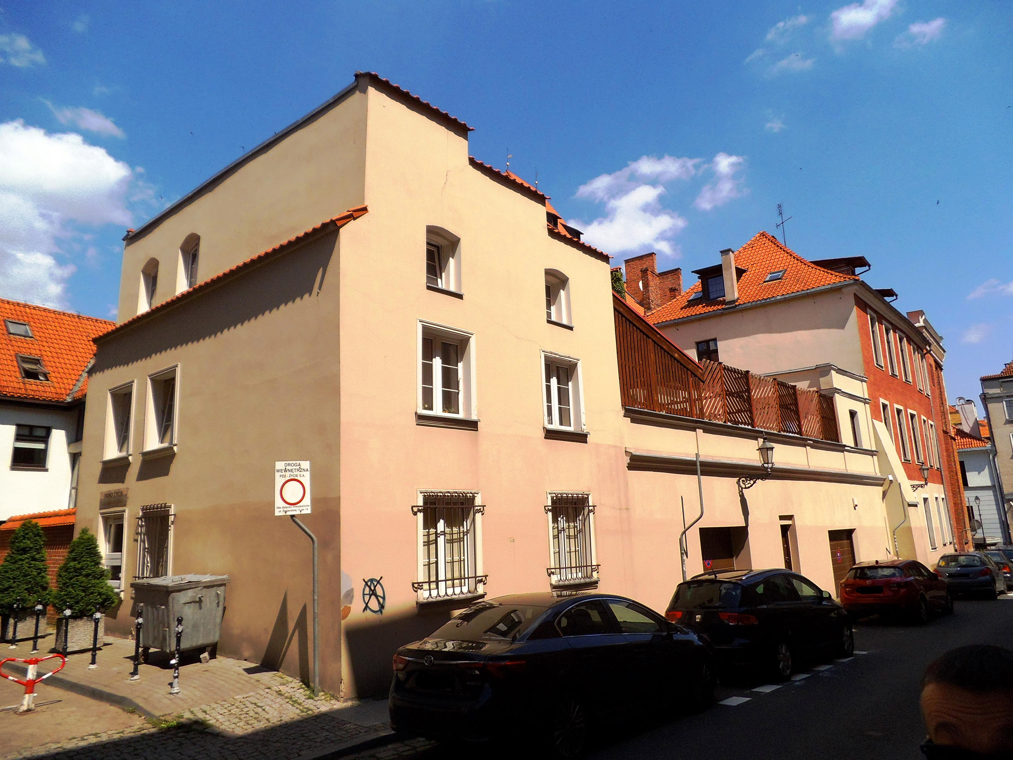 Klasztor elżbietanek w Toruniu